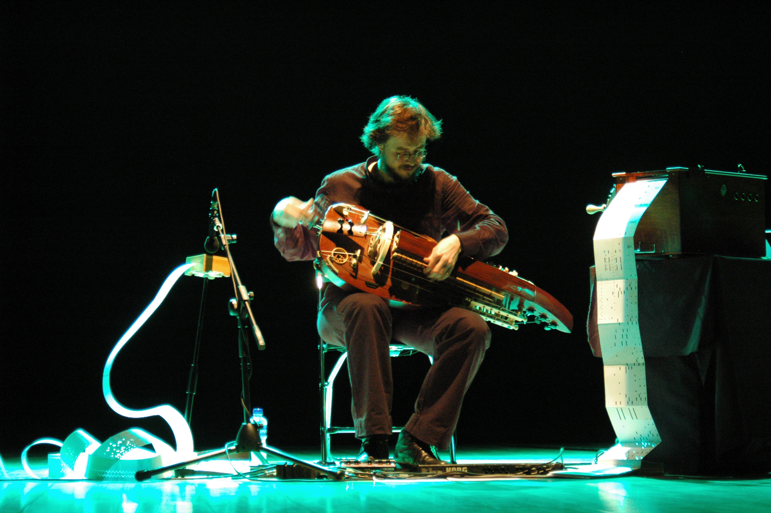 Der spanische Drehleierspieler Germán Díaz bei der Präsentation seines Projektes „música para manivelas“ am 19. März 2006 im Sala Ambigú, Valladolid (Spanien).